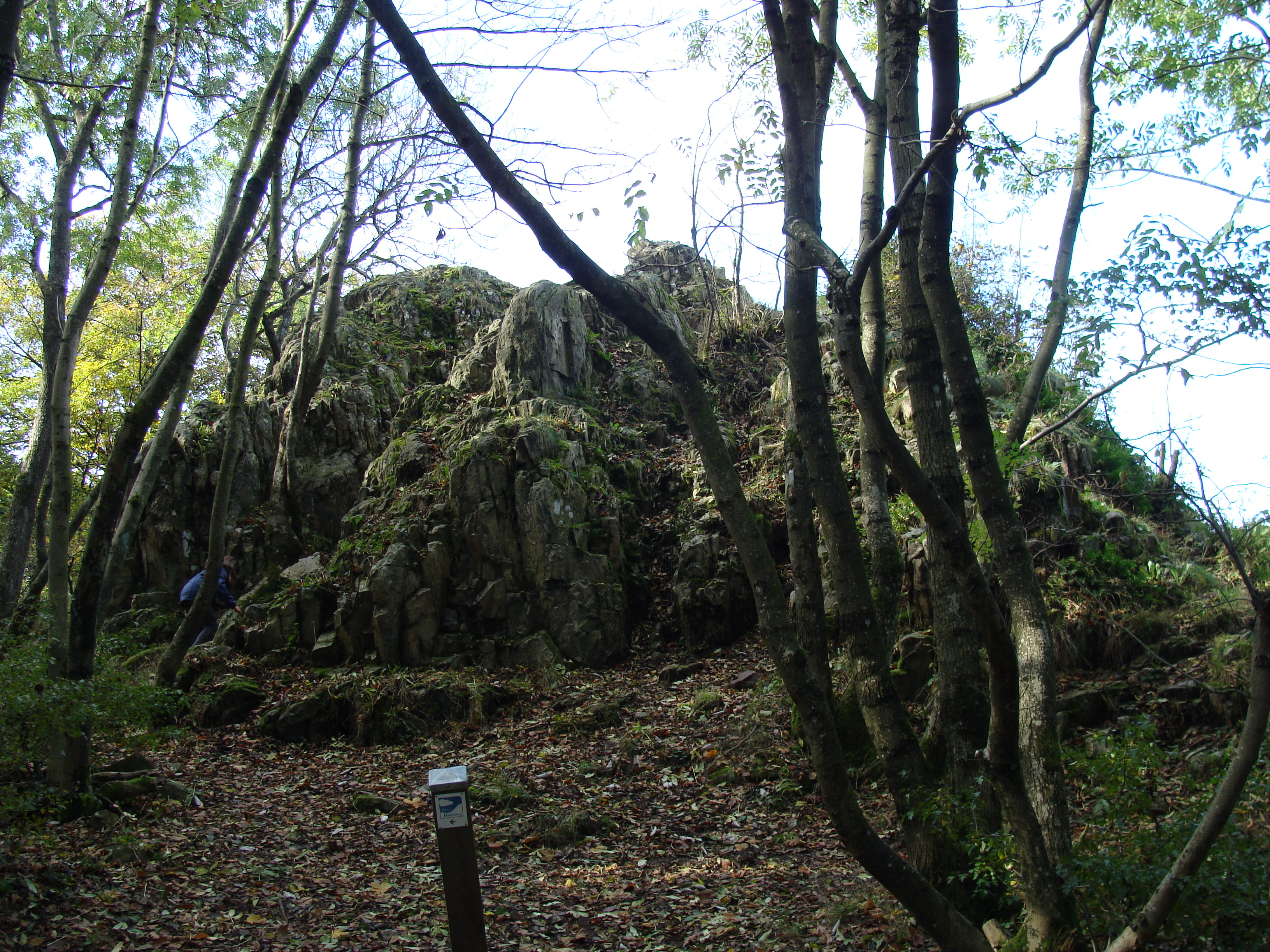 Königsstuhl-Felsen auf dem Donnersberg (Pfälzer Bergland)